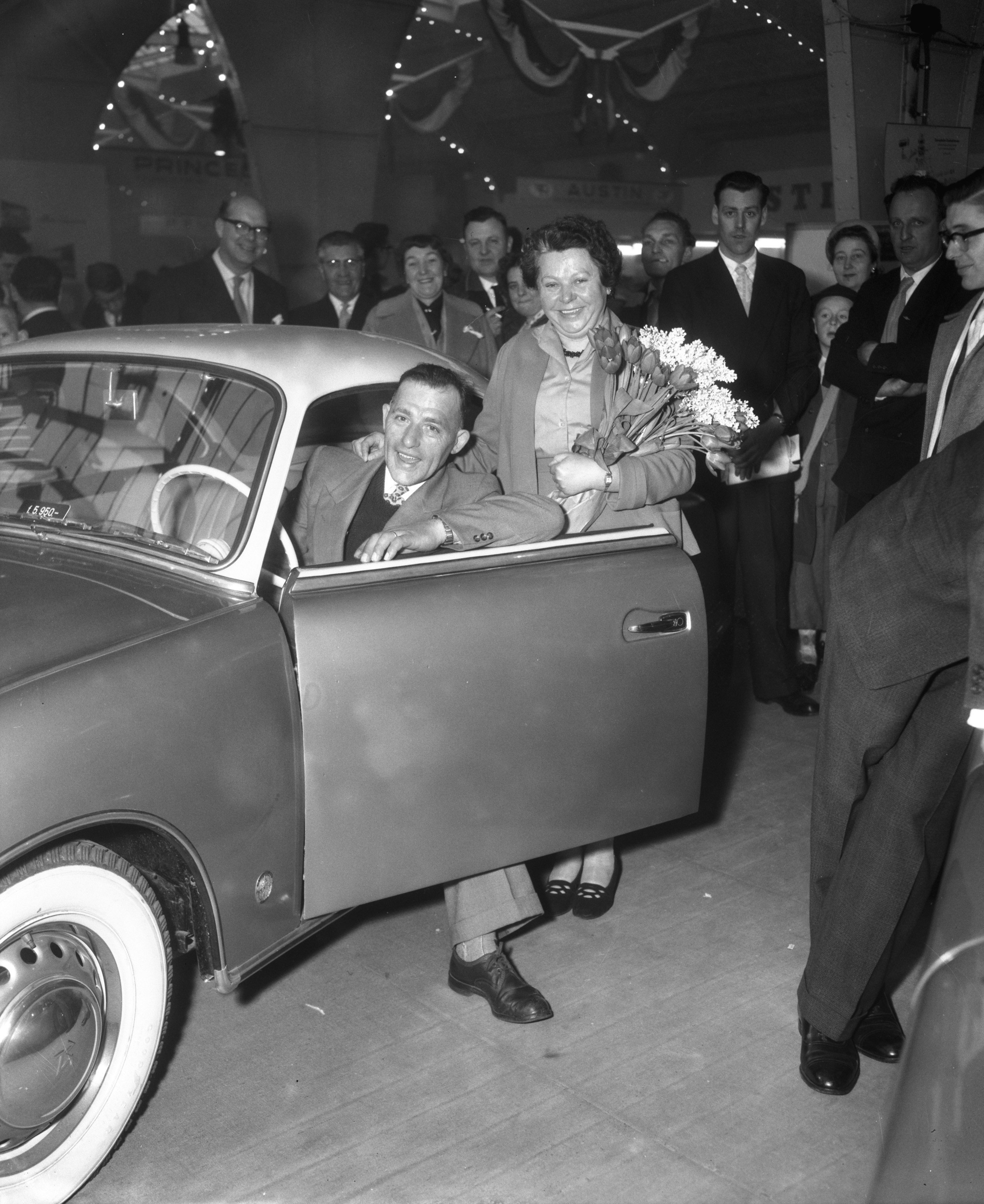 Collectie / Archief : Fotocollectie Anefo Reportage / Serie : [ onbekend ] Beschrijving : 250.000ste bezoeker, Hengelose echtpaar H. J. Nampsink op RAI Datum : 22 februari 1958 Locatie : Amsterdam, Noord-Holland Trefwoorden : bezoekers, echtparen Persoonsnaam : H. J. Nampsink Instellingsnaam : RAI Fotograaf : Pot, Harry / Anefo Auteursrechthebbende : Nationaal Archief Materiaalsoort : Negatief (zwart/wit) Nummer archiefinventaris : bekijk toegang 2.24.01.04 Bestanddeelnummer : 909-3582